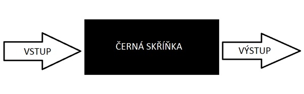 černá skřiňka